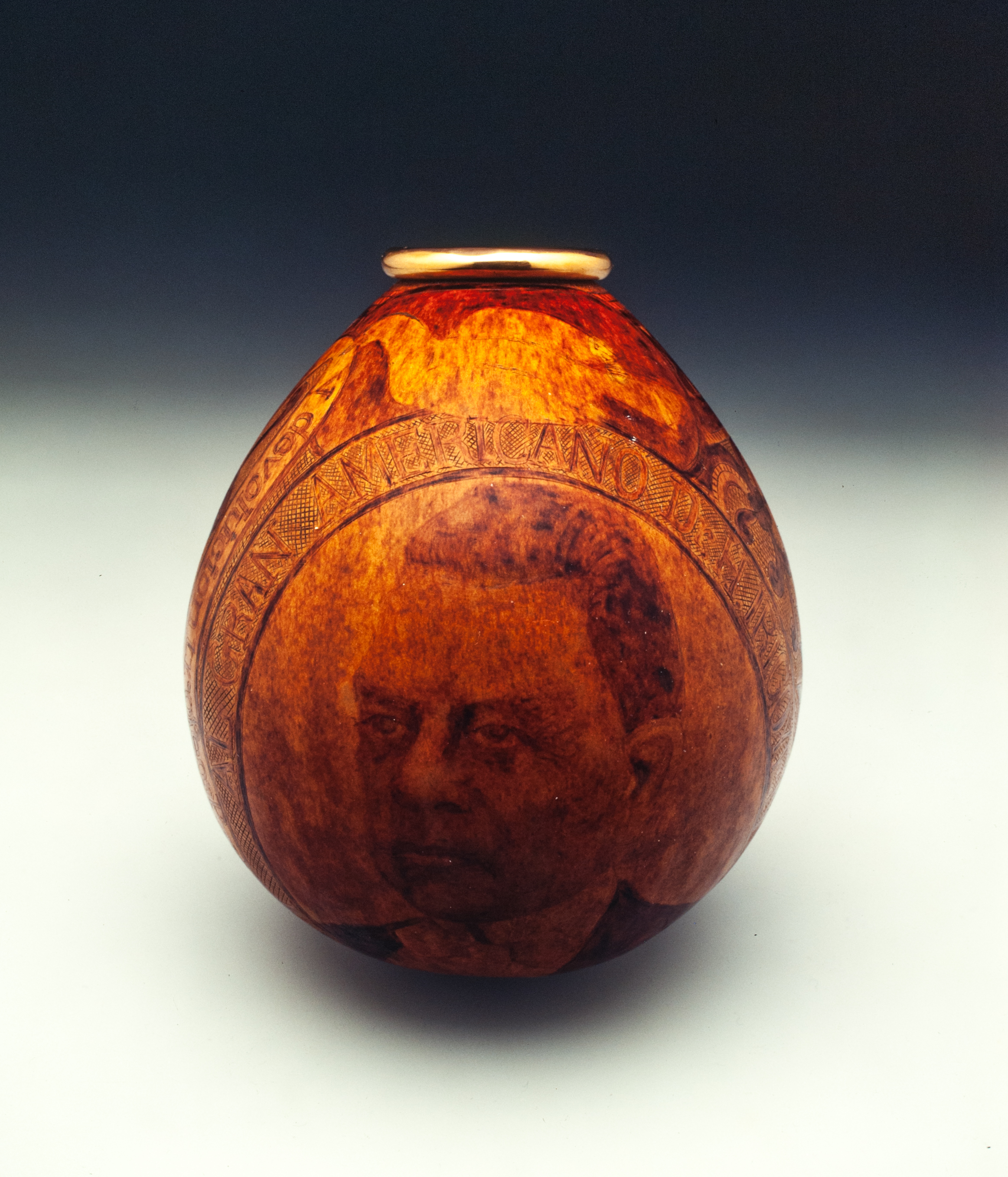 Mate paraguayo, obsequiado al Presidente de Argentina Hipólito Yrigoyen. Ostenta dedicatoria, retrato y Escudo Nacional.